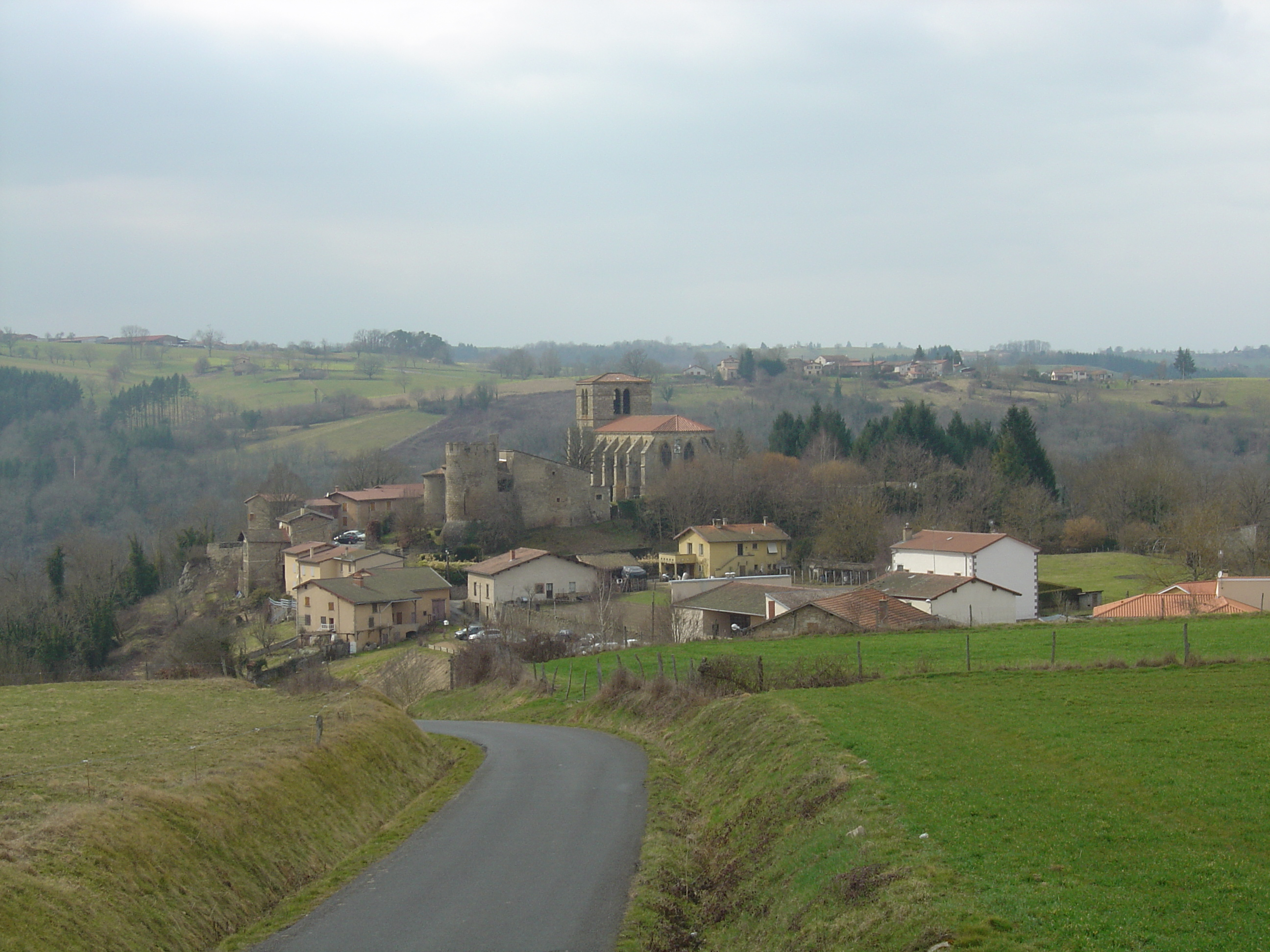 Vue générale de Sauviat